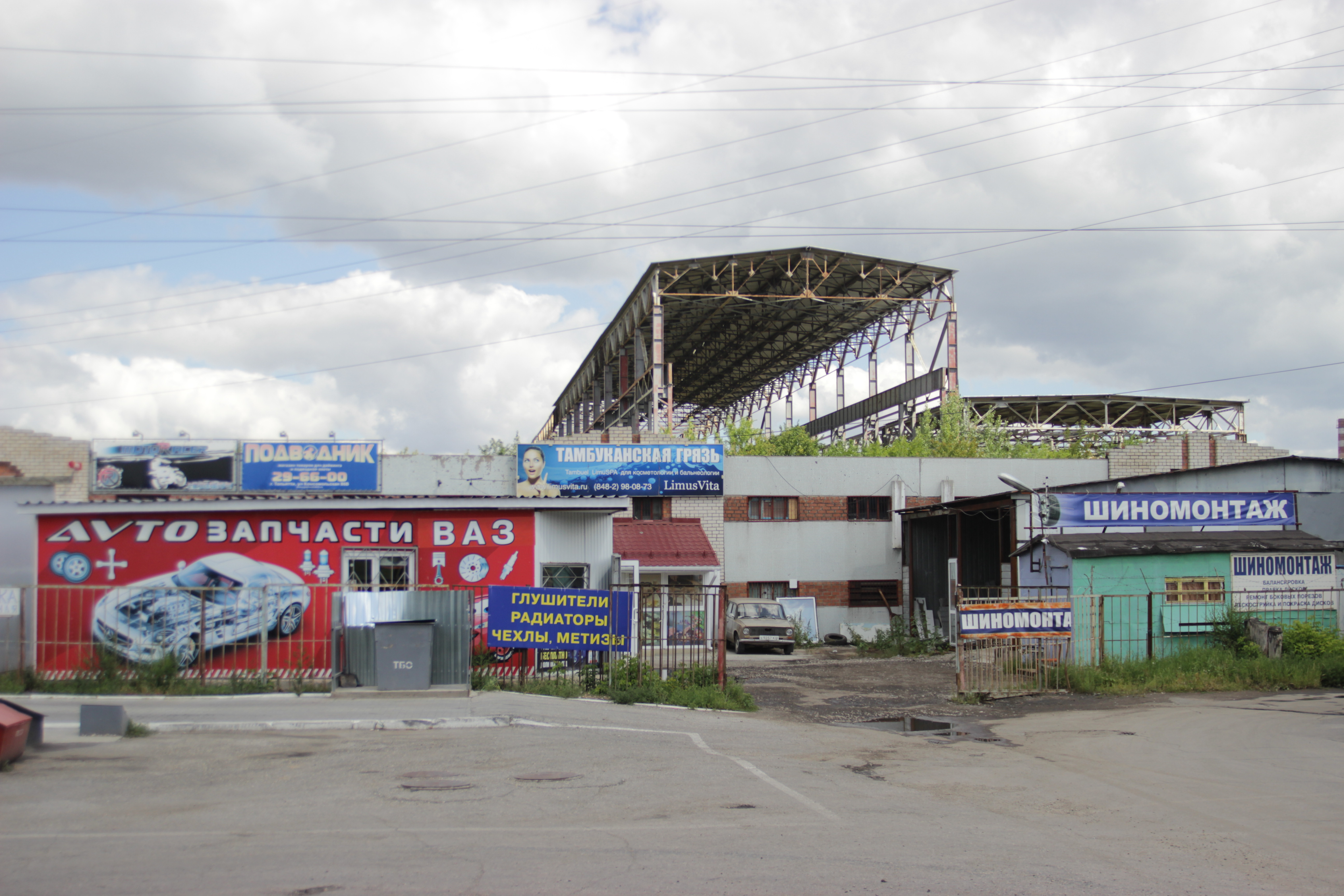 В производственных ГСК до 90% гаражей используются как площадка для различных производств.